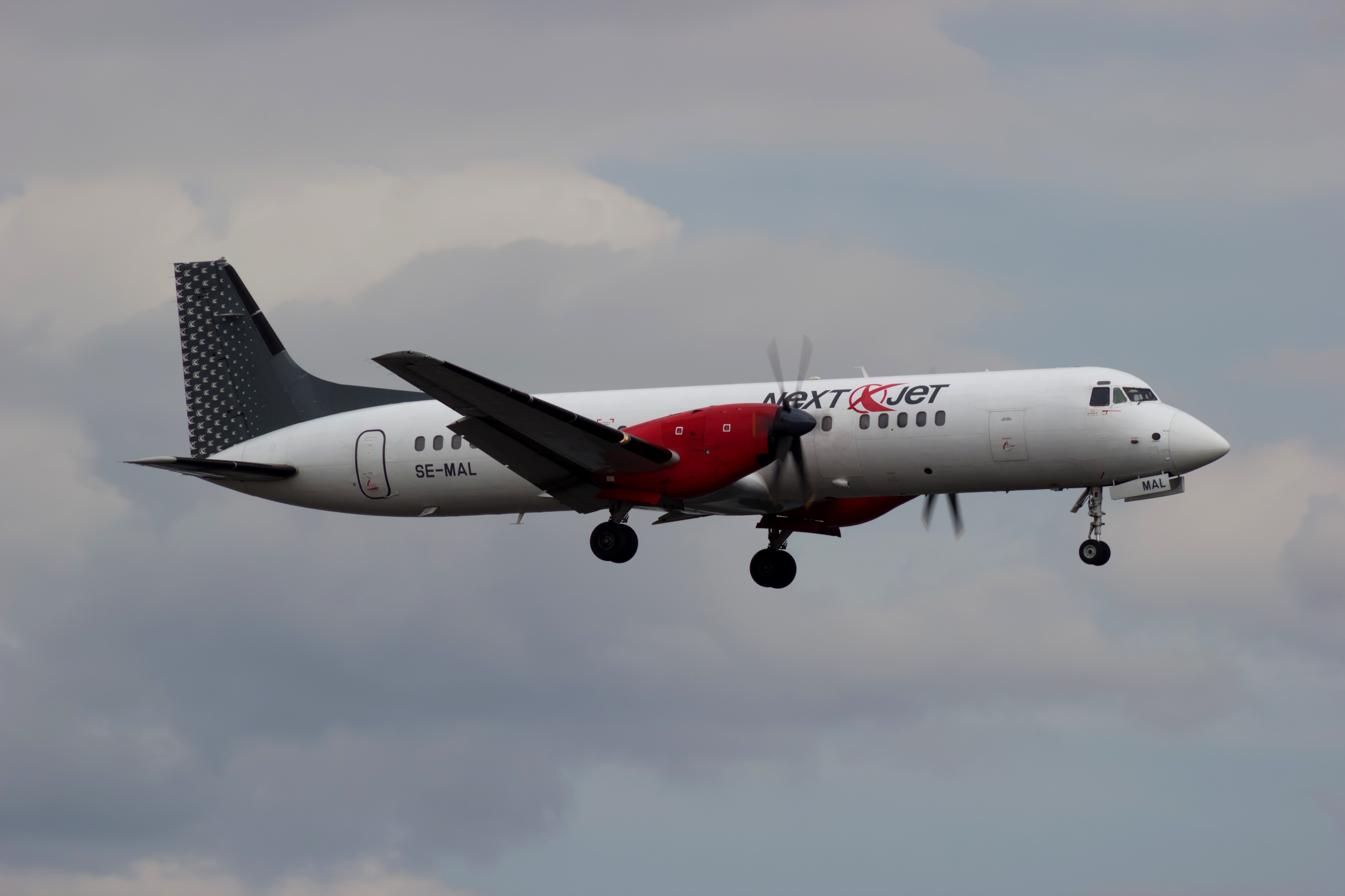 BAe ATP de Nextjet aterrando no aeroporto de Arlanda.